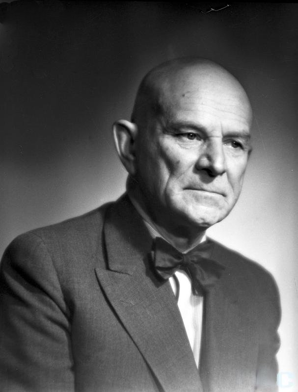 aktor Kazimierz Opaliński (1890-1979).